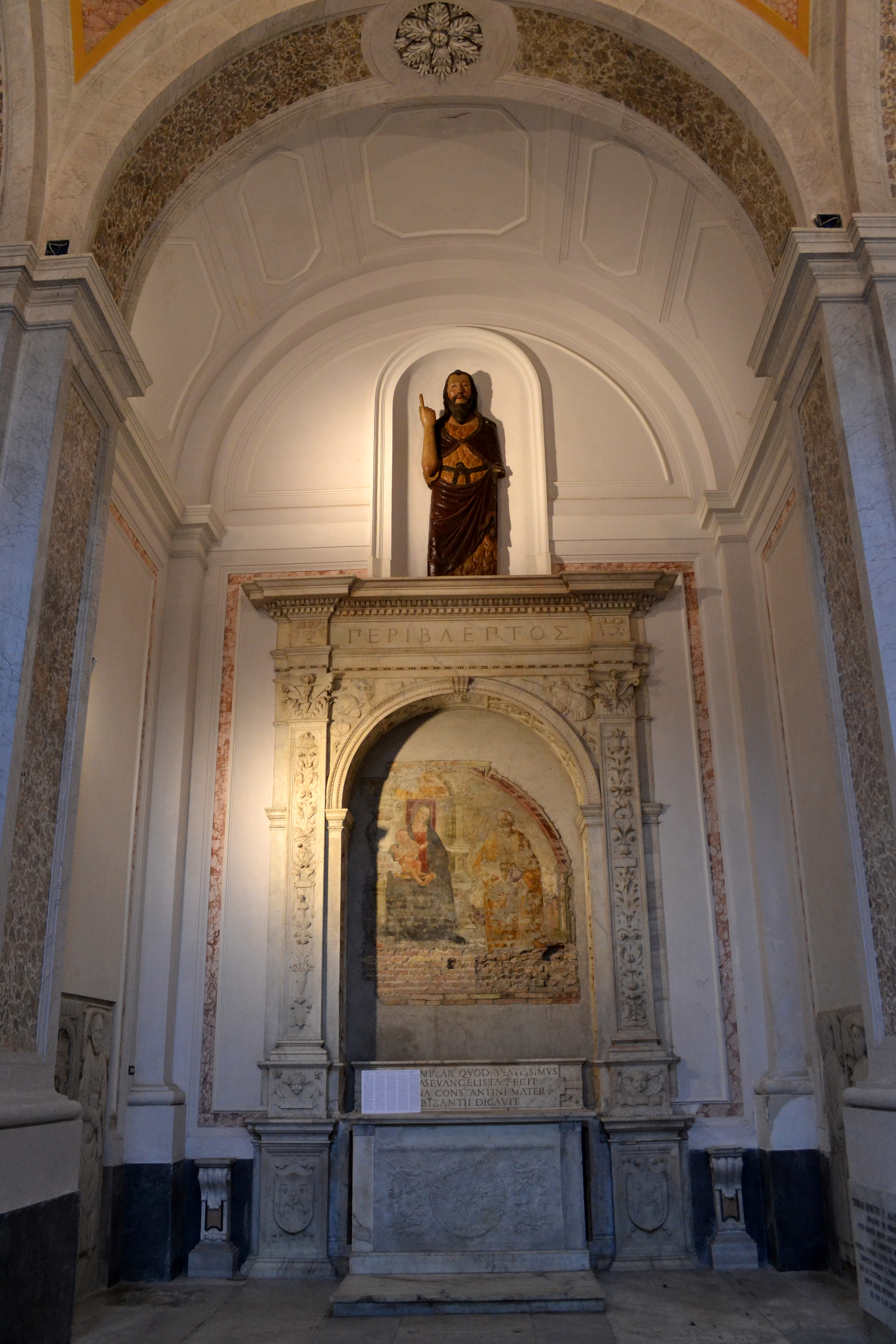 Chiesa di San Giovanni Maggiore di Napoli - Cappella dei Paleologi